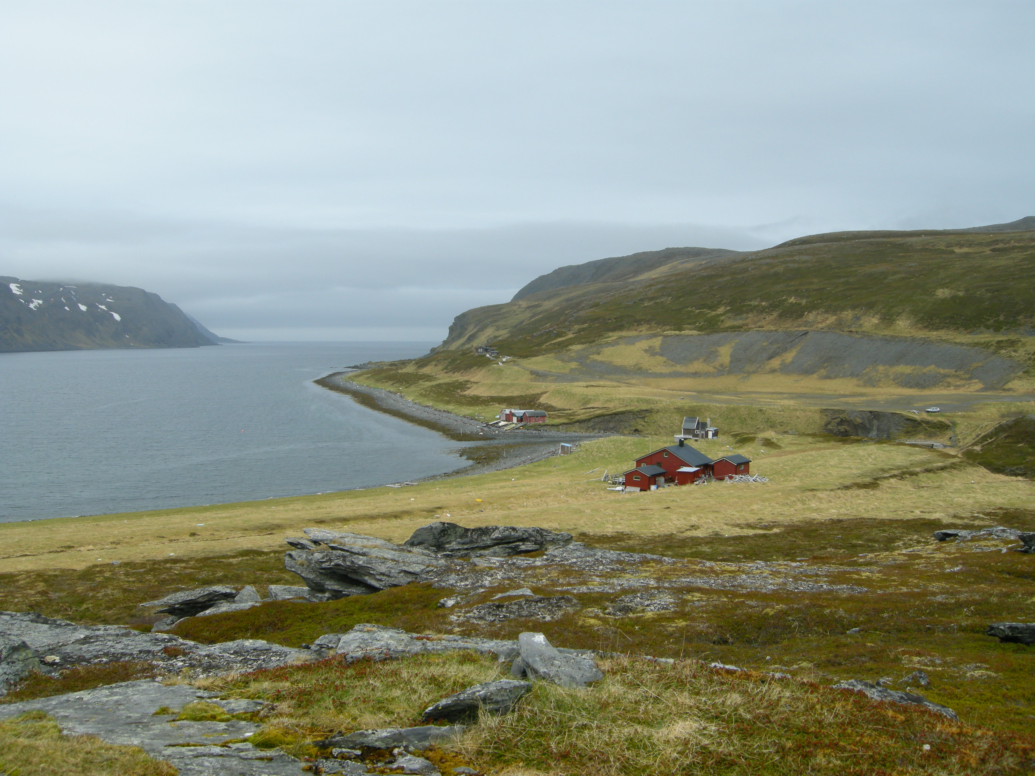 Tufjorden, Magerøya, Nordkapp